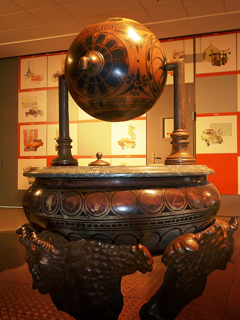 Aelópilo o Aelípila de Herón de Alejandría (Siglo I a. J.C.) Herón de Alejandría conocido sabio, matemático y físico griego fue el primero en experimentar con la fuerza del vapor y fruto de sus trabajos es este aparato. Su funcionamiento es muy sencillo: al calentarse el agua contenida en el recipiente, el vapor pasa a la esfera a través de los dos tubos laterales sobre los que pivota, y sale por las espitas opuestas que hay en la esfera. Por el principio de reacción ésta gira, alcanzando grandes velocidades. El Aelópilo es, por tanto, el primer ingenio en el que el hombre logró generar un movimiento mediante la fuerza del vapor. Recreación realizada por el escultor Andrés Álvarez Ilzarbe. Museo de Historia de la Automoción de Salamanca Native nameMuseo de Historia de la Automoción (Salamanca)LocationSalamanca, (Spain)Coordinates40° 57′ 29.73″ N, 5° 40′ 00.95″ W Established2002Web page control : Q6034050 institution QS:P195,Q6034050